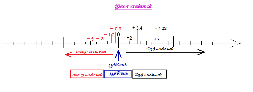 திசையெண்